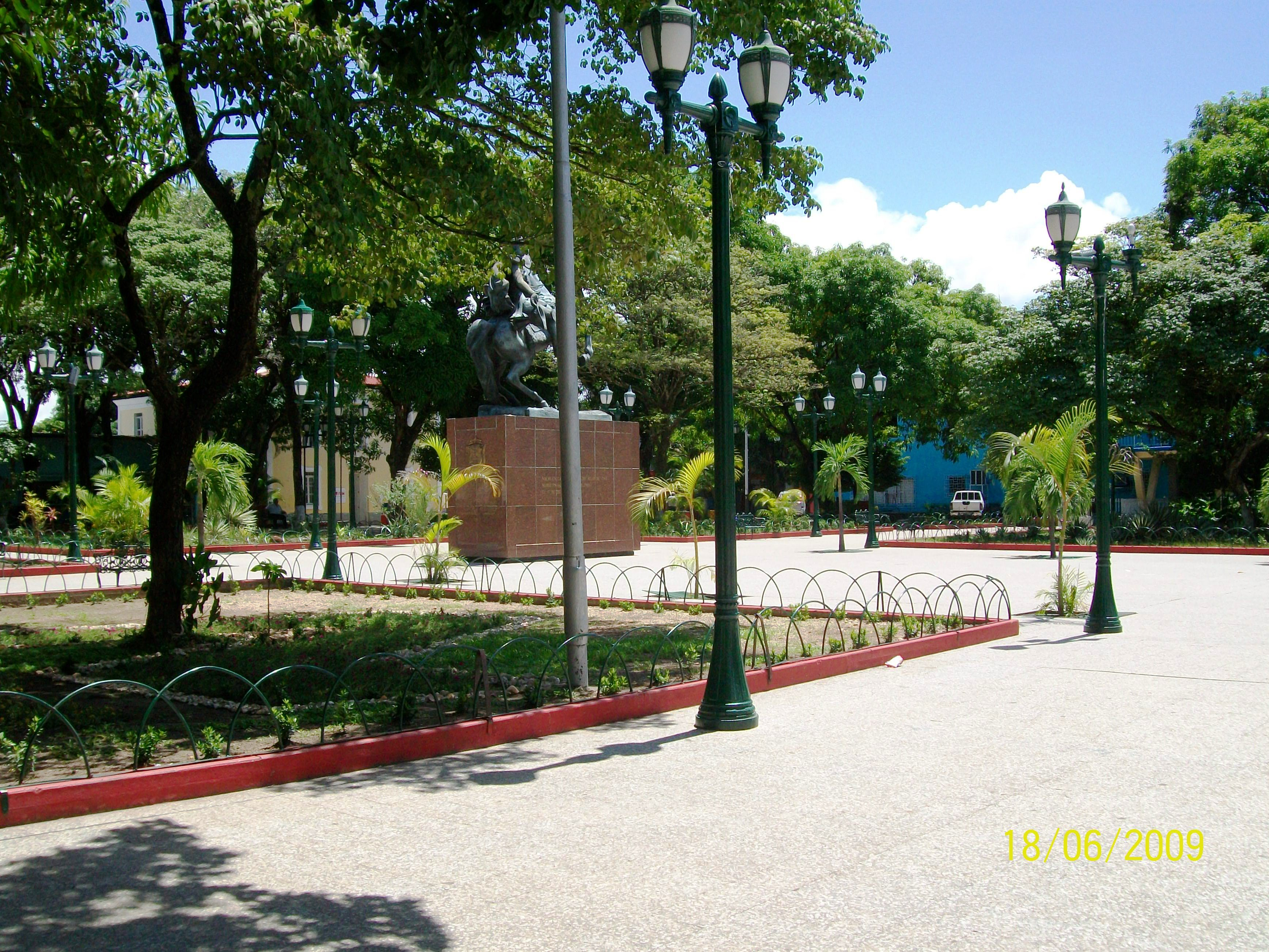 plaza bolivar y la catedral maria auxiliadora dos sitios turiticos importantes de puerto ayacucho muy frecuentado por los puertoayacuchenses y a veces por los turistas nacionales y internacinales,forma parte del casco historico de puerto ayacucho